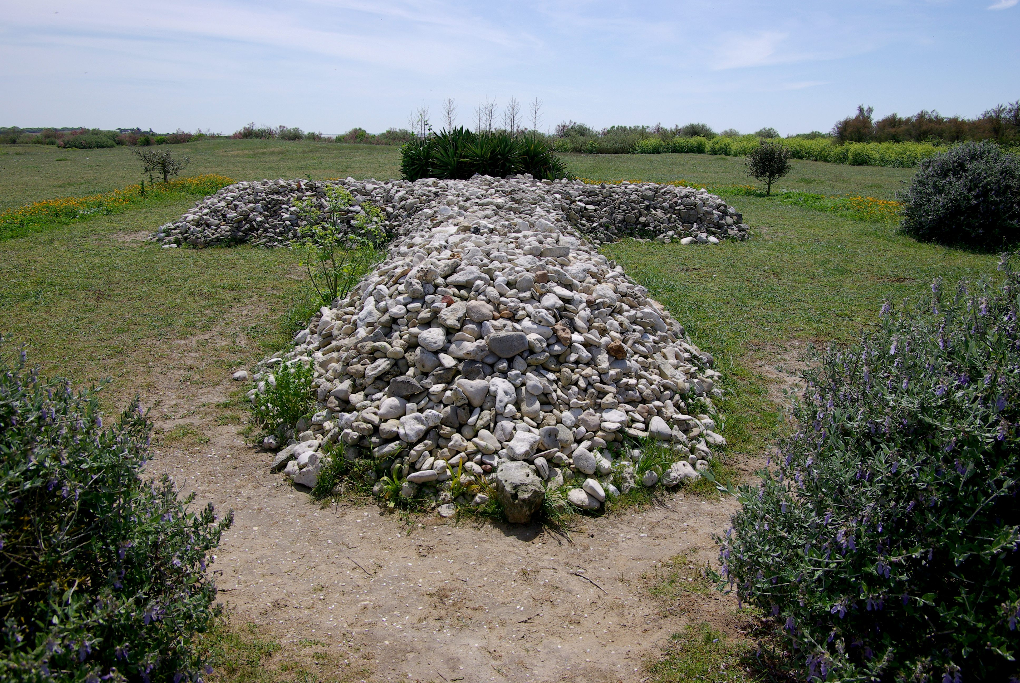 Croix de Galets à la mémoire des prêtres déportés en 1794. Île Madame, Charente-Maritime, France.